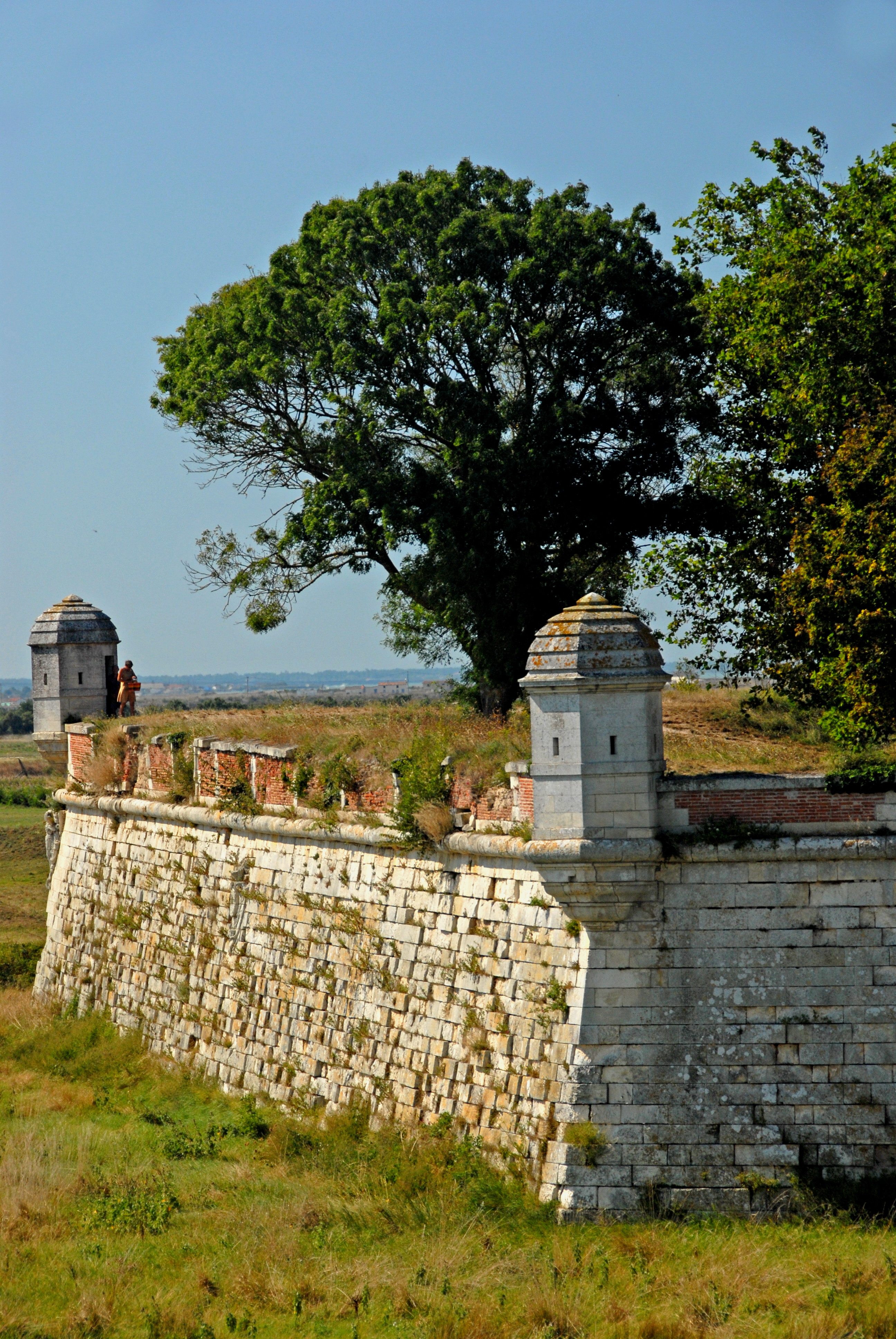 Brouage, 2 Wachtürmchen, Bastion Richelieu, Brüstung